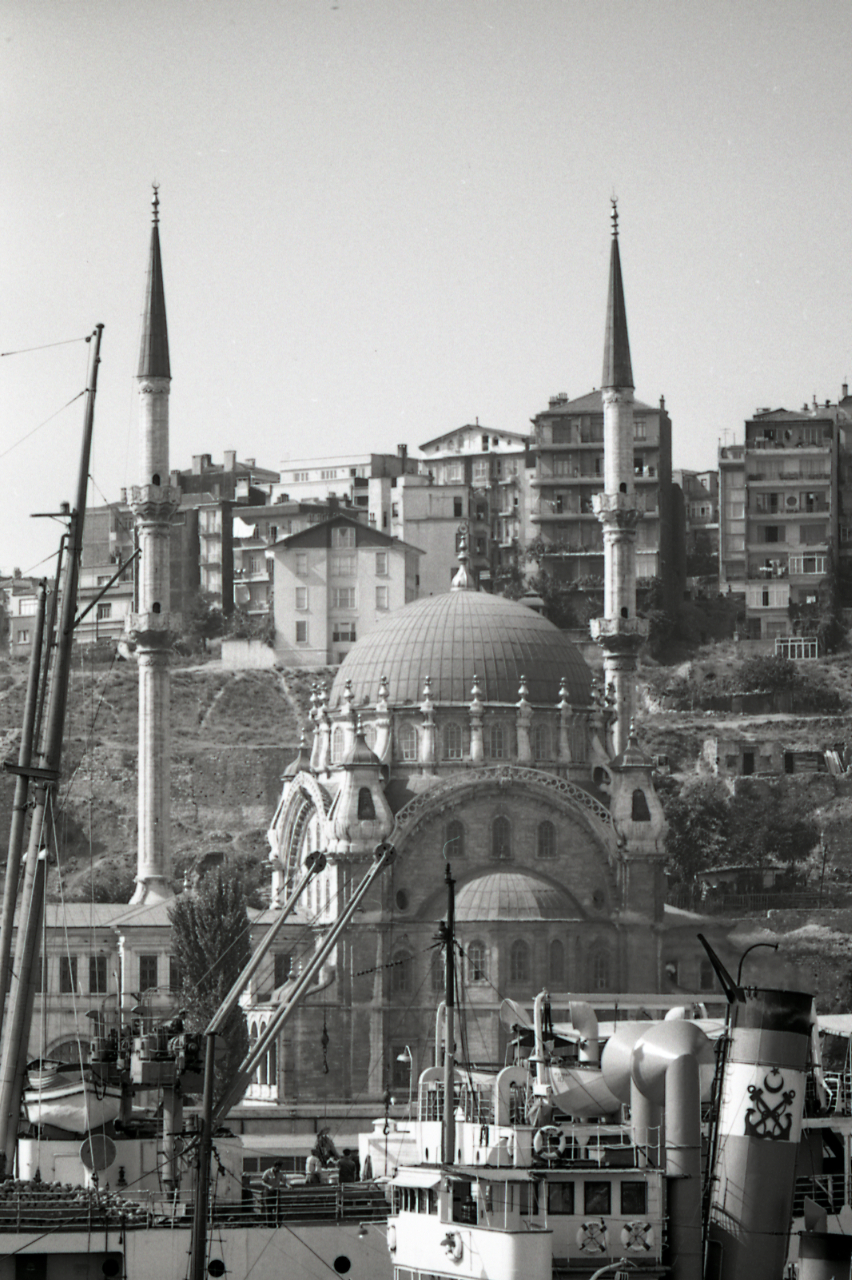 Serie fotografica : Istanbul, 1962 / Paolo Monti. - Strisce: 6, Fotogrammi complessivi: 36 : Negativo b/n, gelatina bromuro d'argento/ pellicola ; 35 mm. - ((I fotogrammi hanno una doppia numerazione. - Sul portanegativi: Pentax Pan F Ilford. - Fonte: Agenda di Paolo Monti: Foto Leica 1 / 1-51 verde, 1-110 nera (1958-1963), presso Archivio Paolo Monti